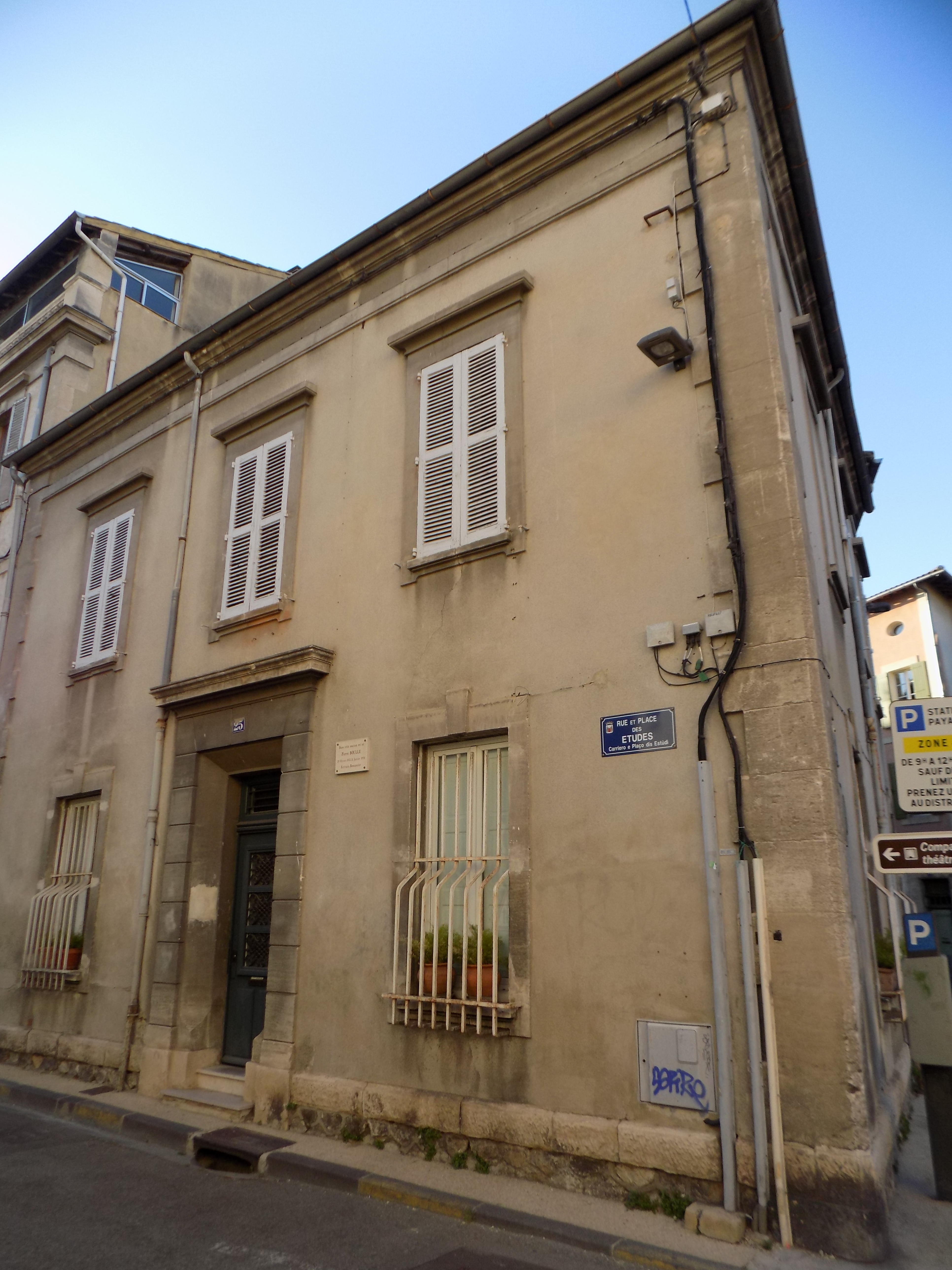 La maison natale de l'écrivain français Pierre Boulle, à Avignon (2016). Une plaque commémorative rappelant sa naissance a été apposée sur la façade.